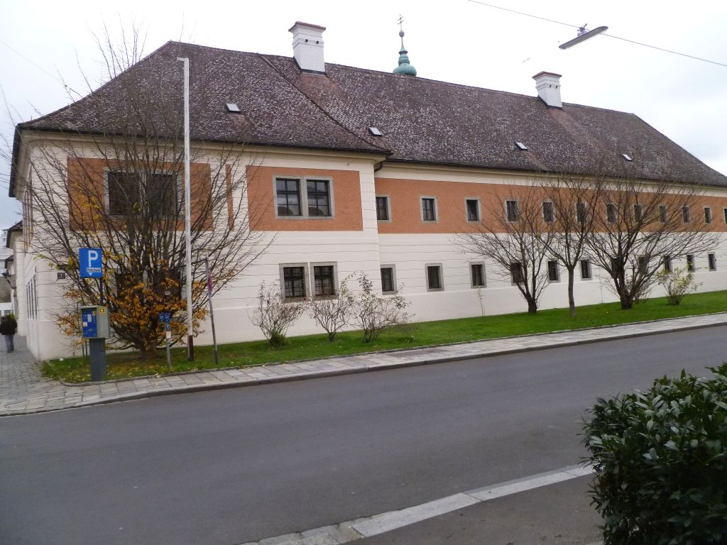 Prunerstift (Linz) - Seitenflügel